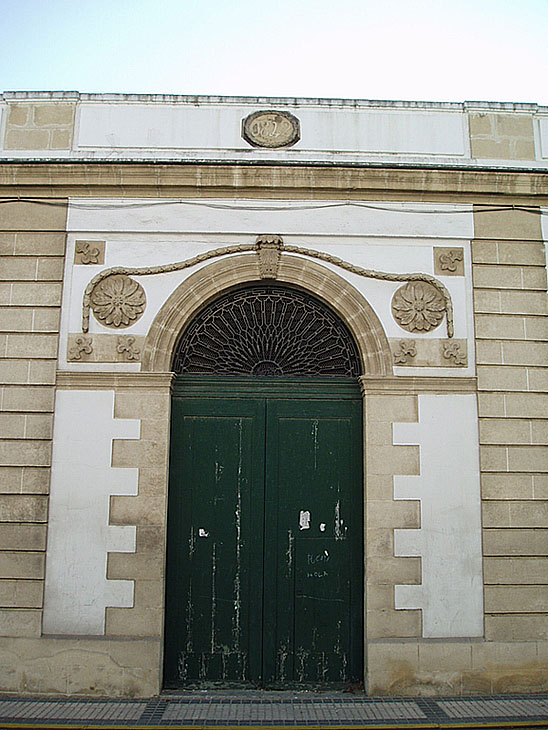 Bodega del siglo XIX del Campo de Guía, en El Puerto de Santa María, España.